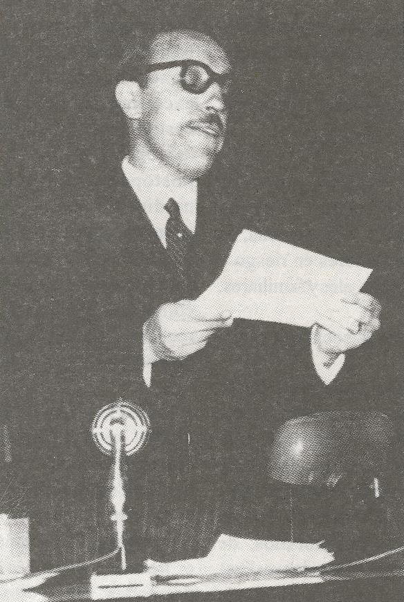 Angel T. Lo Celso